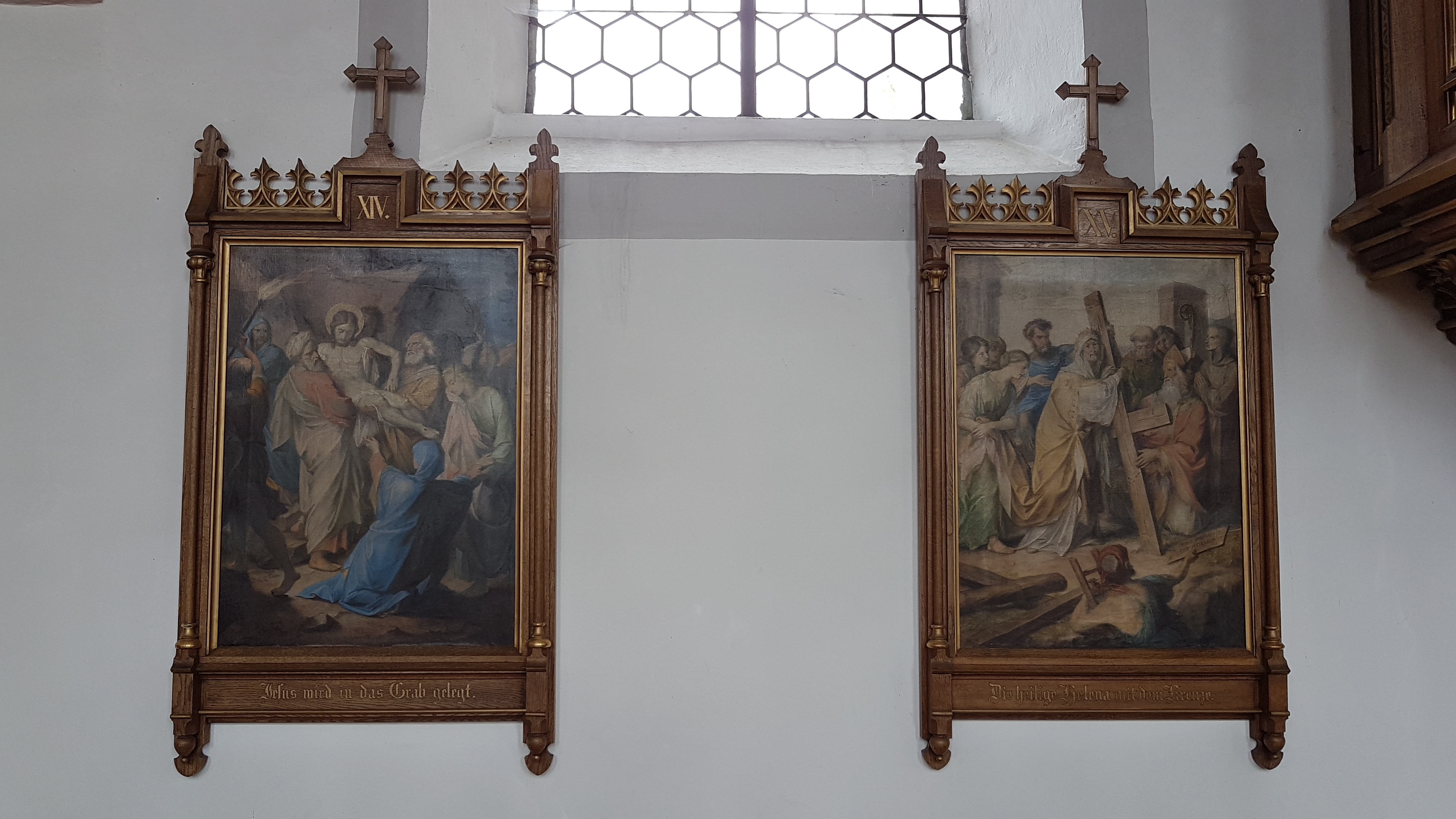 Rettenbach am Auerberg, Pfarrkirche St. Vitus